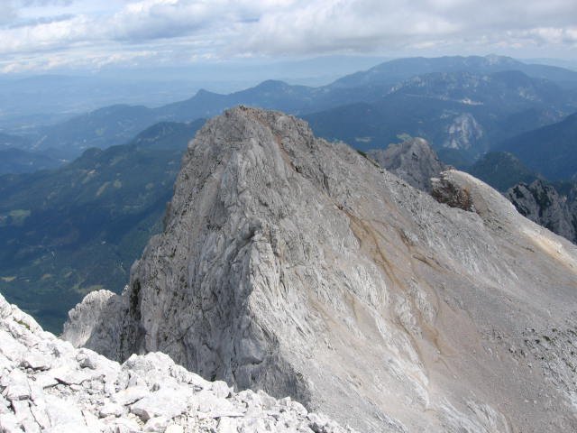 Koroška Rinka, z vrha Kranjske Rinke